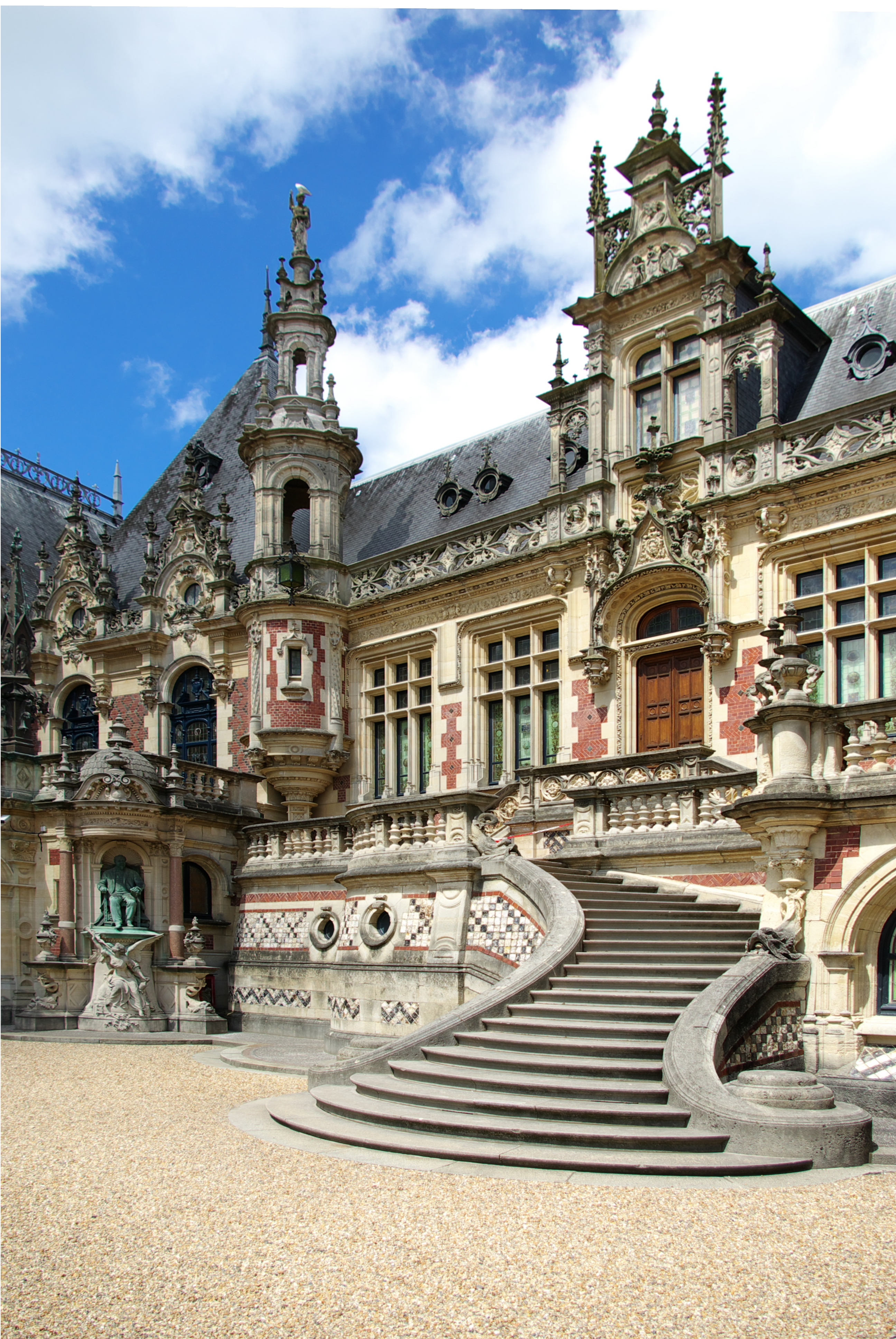 Palais Bénédictine à Fécamp. Cour intérieur.